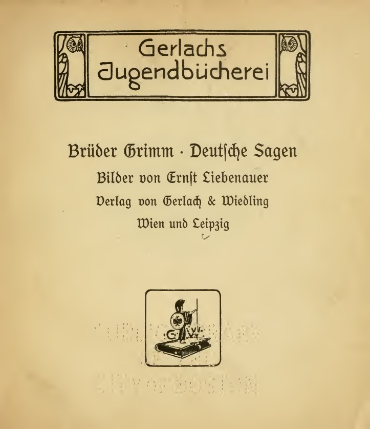 Deutsche Sagen / Bruder Grimm ; Bilder von Ernst Liebenauer. - Wien und Leipzig : Gerlach & Wiedling, 1912. - 122 p. : ill. ; 16 cm . Frontespizio